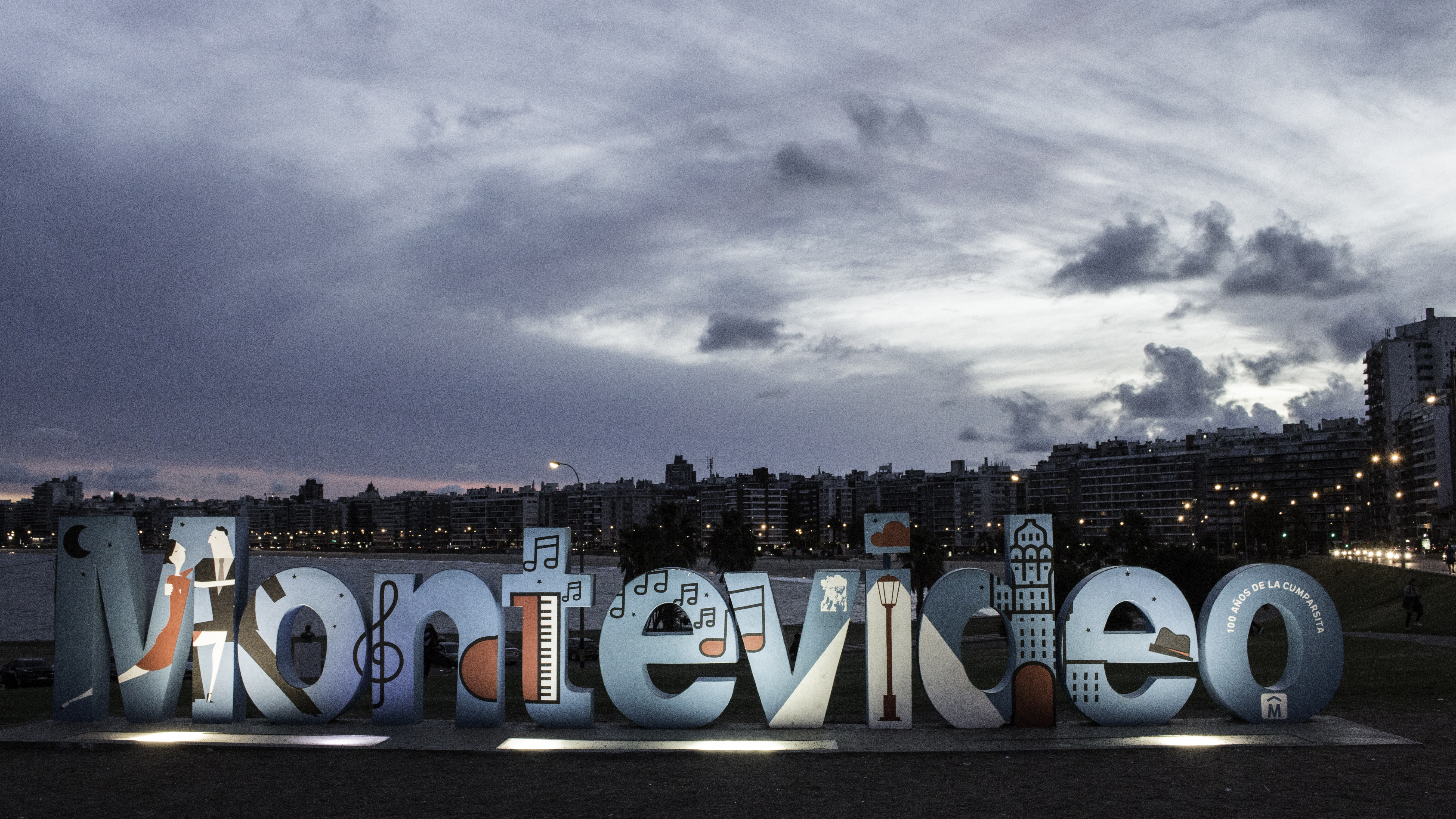 Atardecer en La Rambla. Ciudad de Montevideo, República Oriental del Uruguay